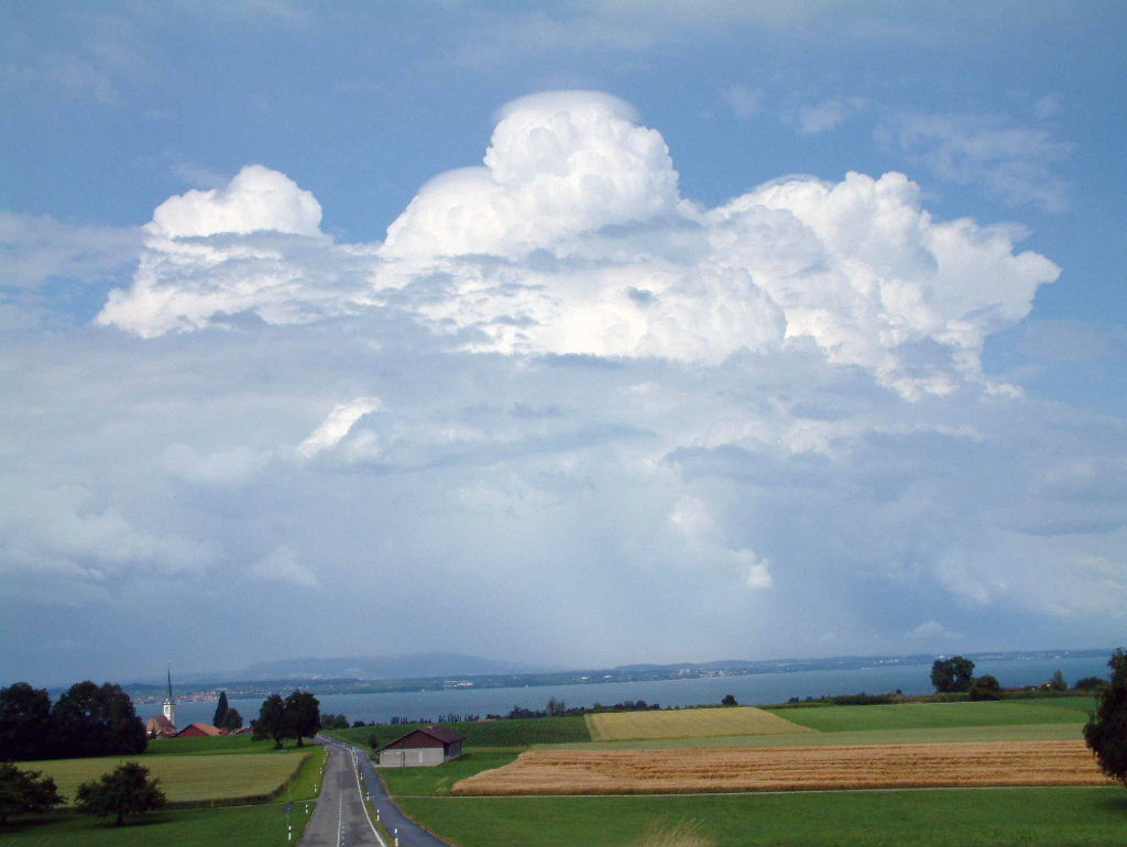 Bouřkový oblak supercelární bouře nad Friedrichshafenem (Německo) u Bodamského jezera, vyfoceno v Altnau (Švýcarsko).